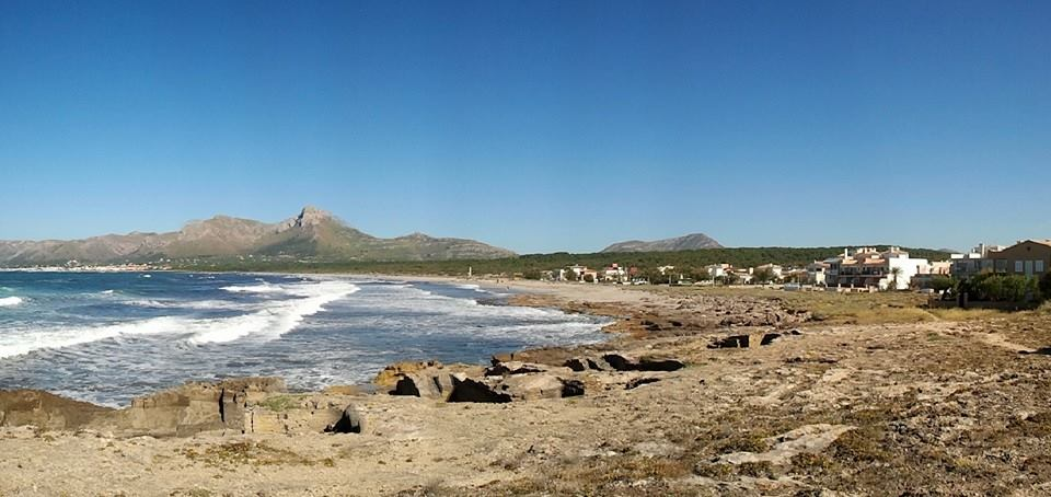 Platja de Son Serra de Marina in Son Serra de Marina in der Gemeinde Santa Margalida, Mallorca, Spanien